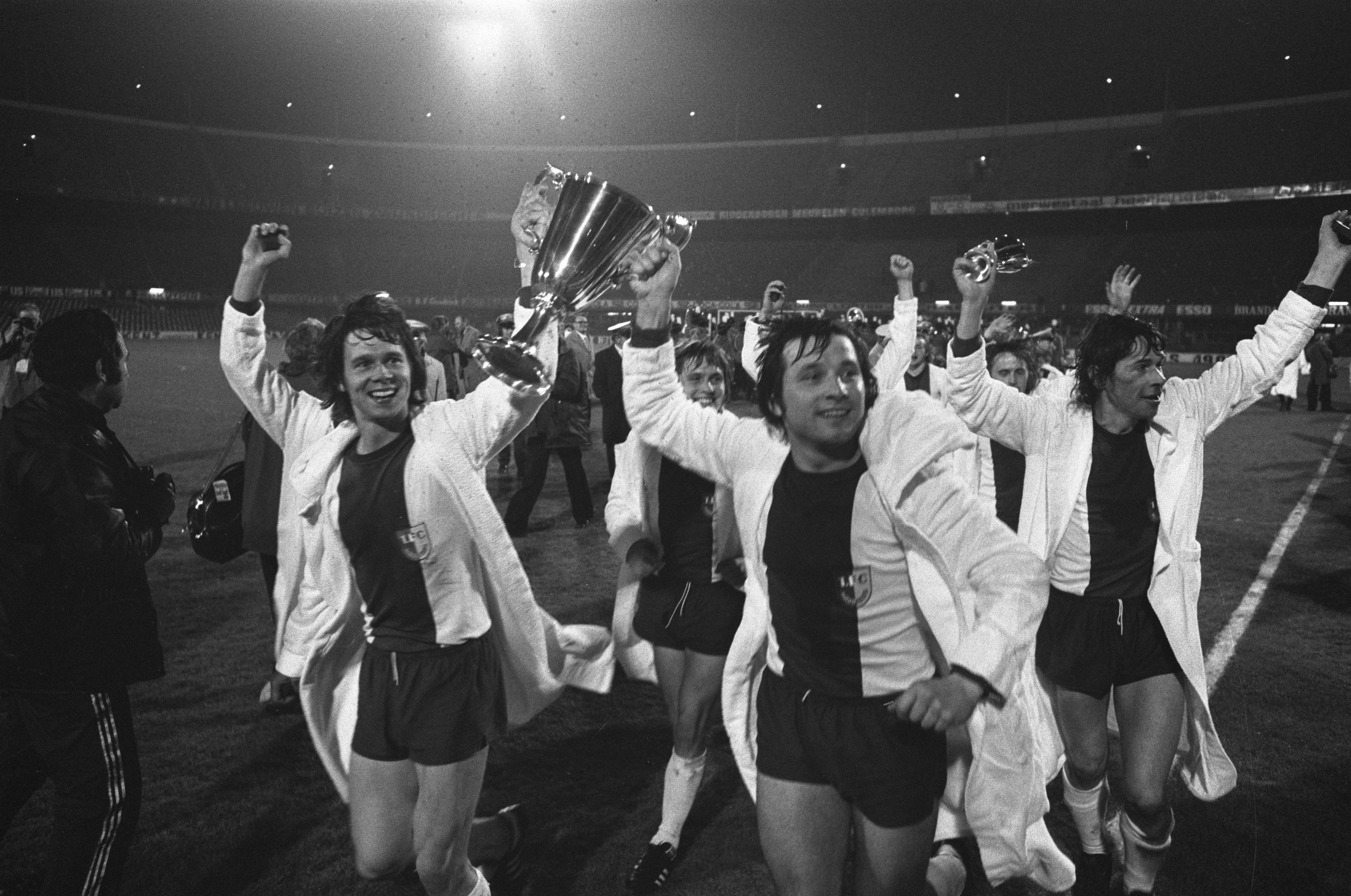 Collectie / Archief : Fotocollectie Anefo Reportage / Serie : [ onbekend ] Beschrijving : AC Milan tegen FC Magdeburg 0-2, finale Europacup II spelers met beker Datum : 8 mei 1974 Trefwoorden : bekers, sport, voetbal Persoonsnaam : Fc Magdeburg Instellingsnaam : AC Milaan Fotograaf : Verhoeff, Bert / Anefo Auteursrechthebbende : Nationaal Archief Materiaalsoort : Negatief (zwart/wit) Nummer archiefinventaris : bekijk toegang 2.24.01.05 Bestanddeelnummer : 927-1797